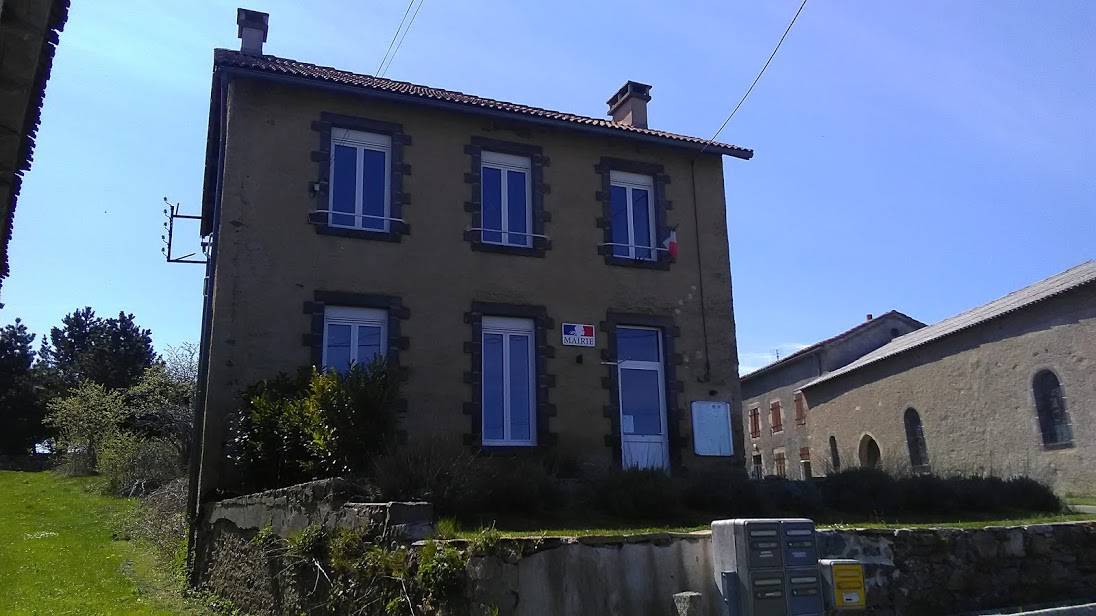 Mairie de Chazelles (Cantal).